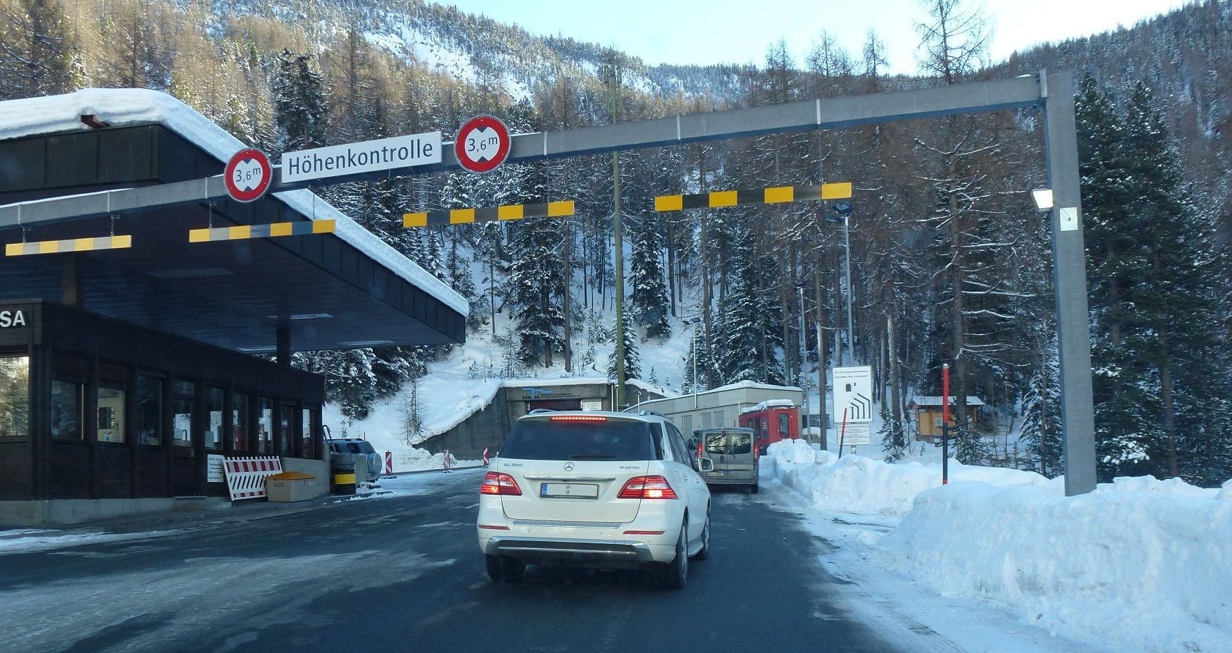 Munt-la-Schera-Tunnel, Nordportal